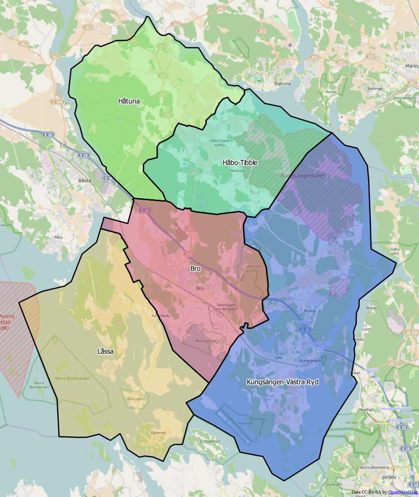 Distriktsindelningen i Upplands Bro kommun World file: 53.10216177836468177 0 0 -53.10216177836468177 1942142.56285868119448423 8323925.97163601685315371